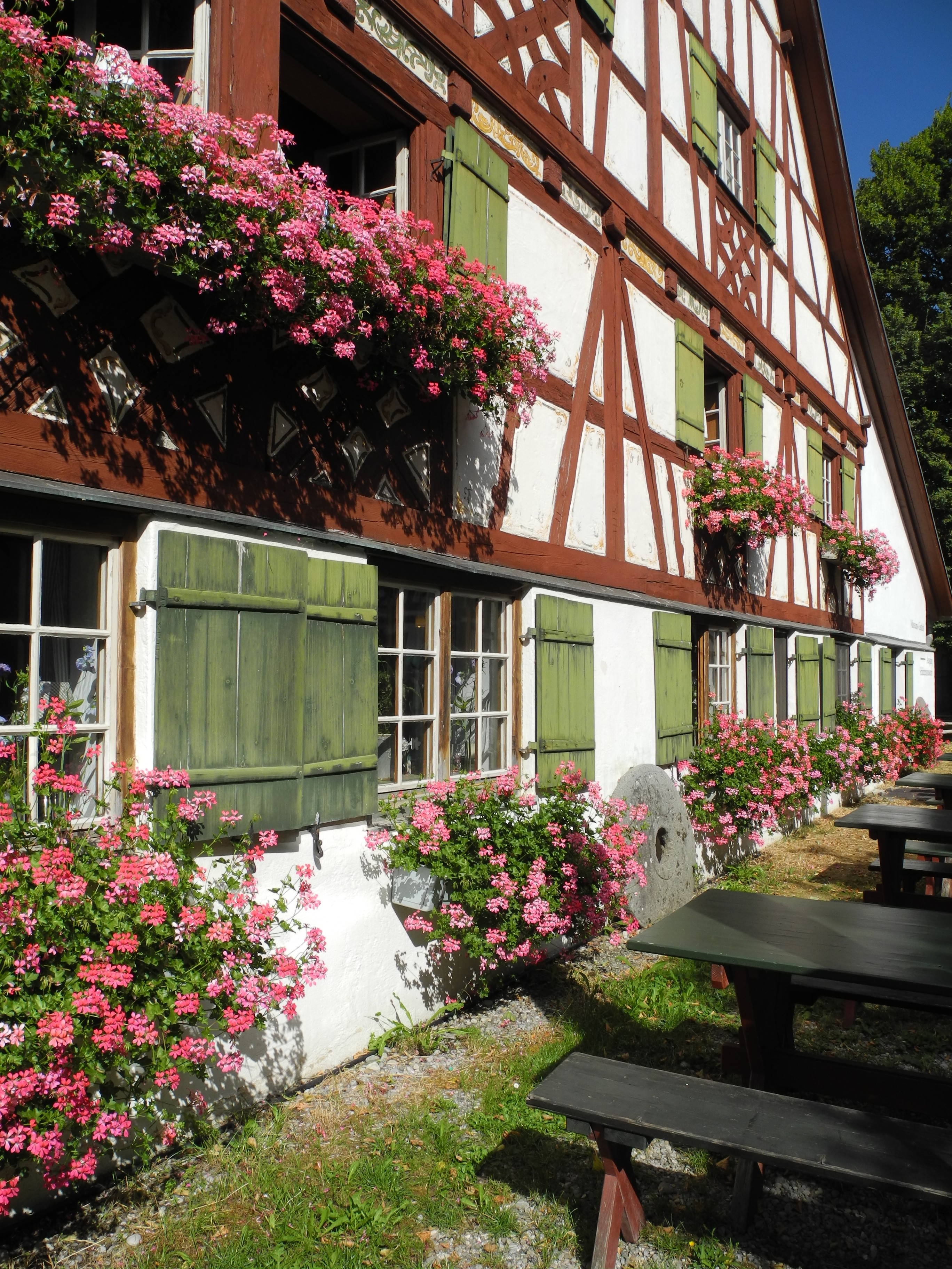 Illerbeuren - Bauernhofmuseum